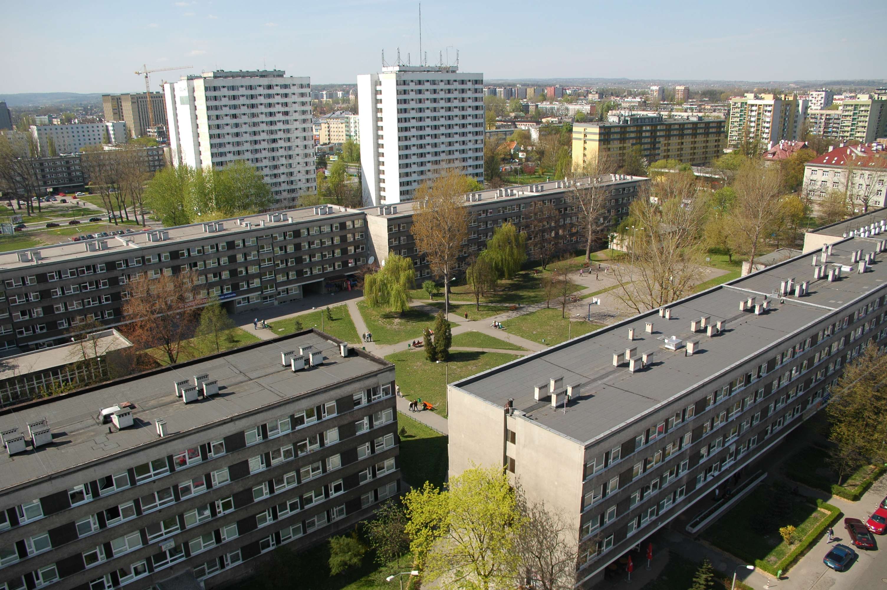 Miasteczko studenckie AGH w Krakowie, widok z DS14 Kapitol